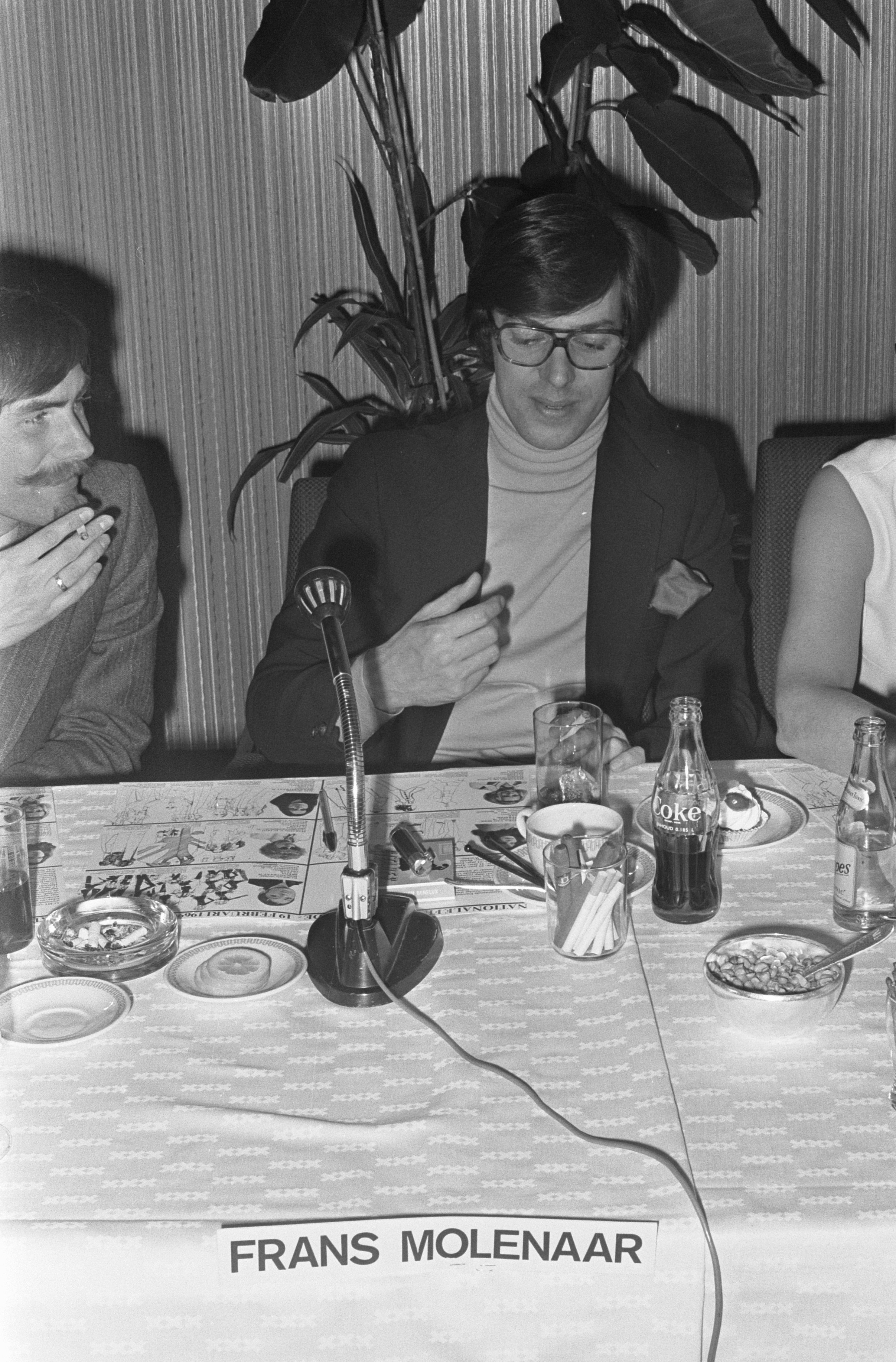 Nationale finale Euromode-ontwerpwedstrijd in Hilton Hotel Amsterdam 2,3 Bert Zuiderveen, 4 Frans Molenaar, 5 Sanne van Liemt